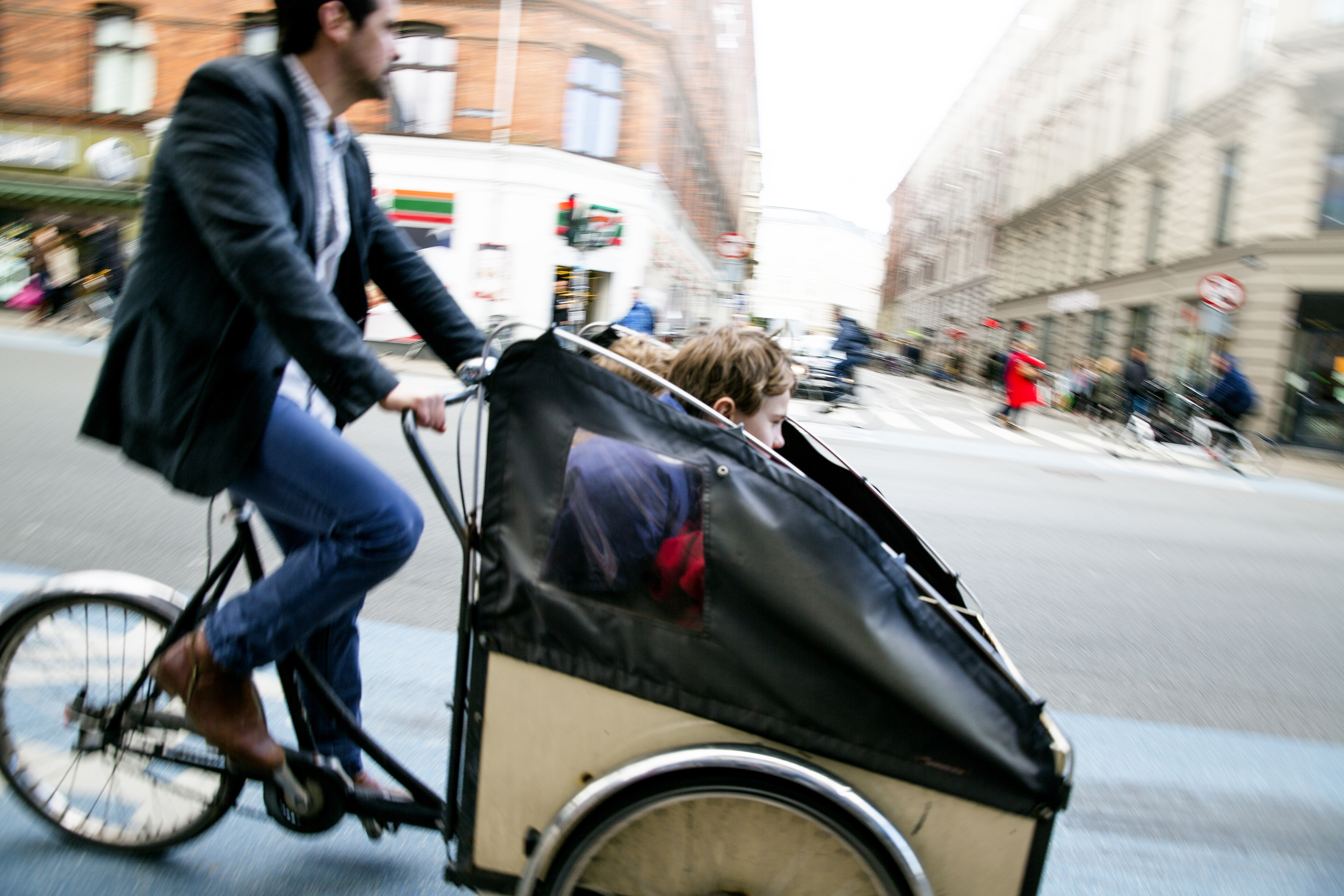 Lådcykel / Cargo bike, Nørregade, Copenhagen / Köpenhamn / København.